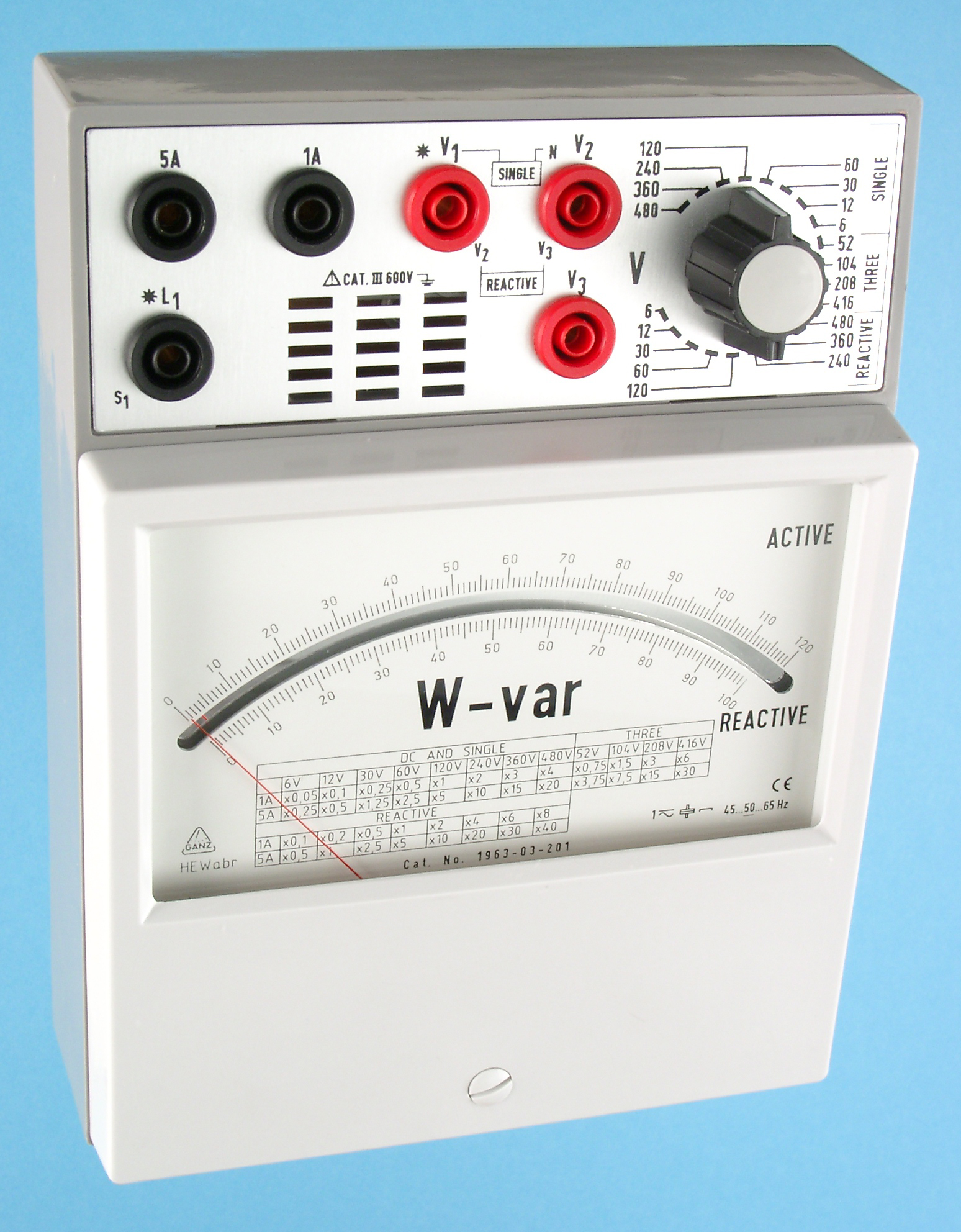 Kombinált hatásos- és meddő teljesítménymérő műszer